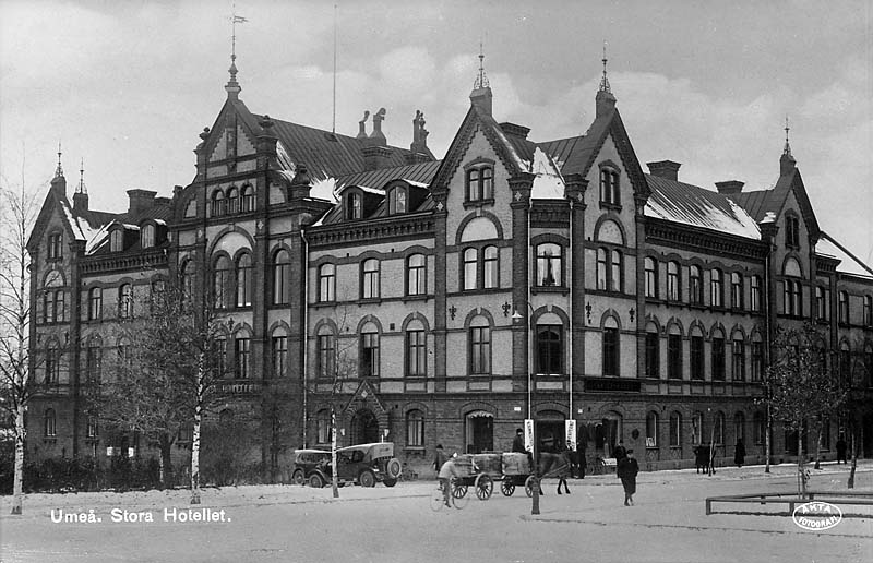 Stora hotellet.; Byggnadsverk; Hotell; Kommunikationsväsen; Miljöer; Stadsmiljö